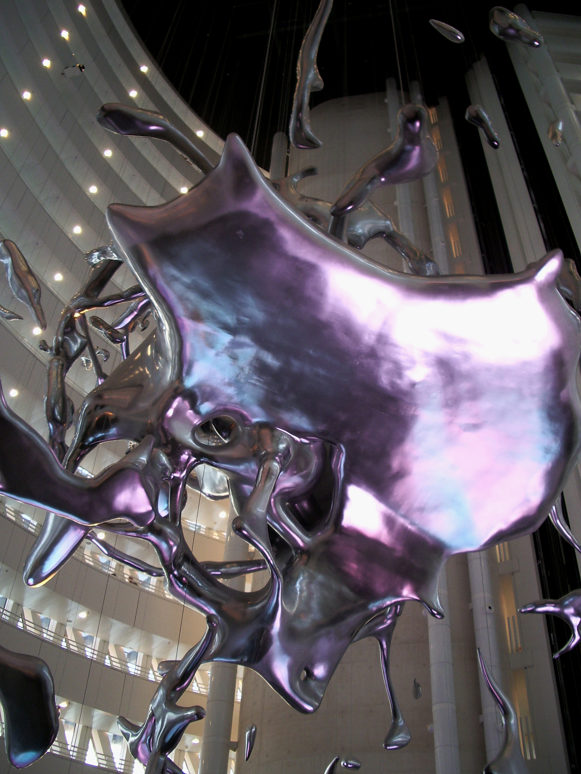 Interior de la Torre del Agua de la Exposición Internacional de Zaragoza de 2008, donde se aprecia la escultura Splash, diseñada por Pere Gifre.